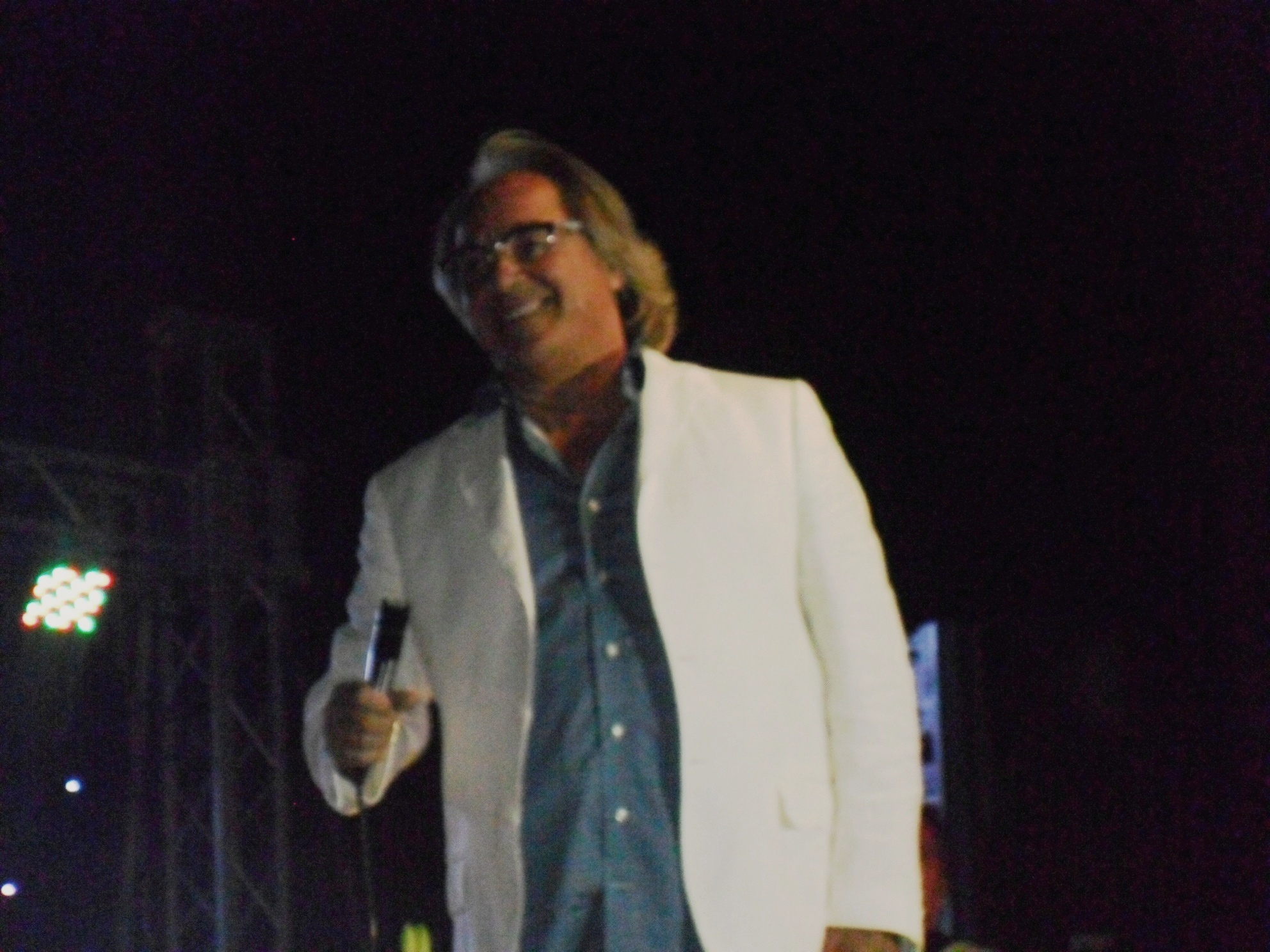 Mauro Nardi in una foto scattata da me, il 2 agosto 2014 a Palermo.